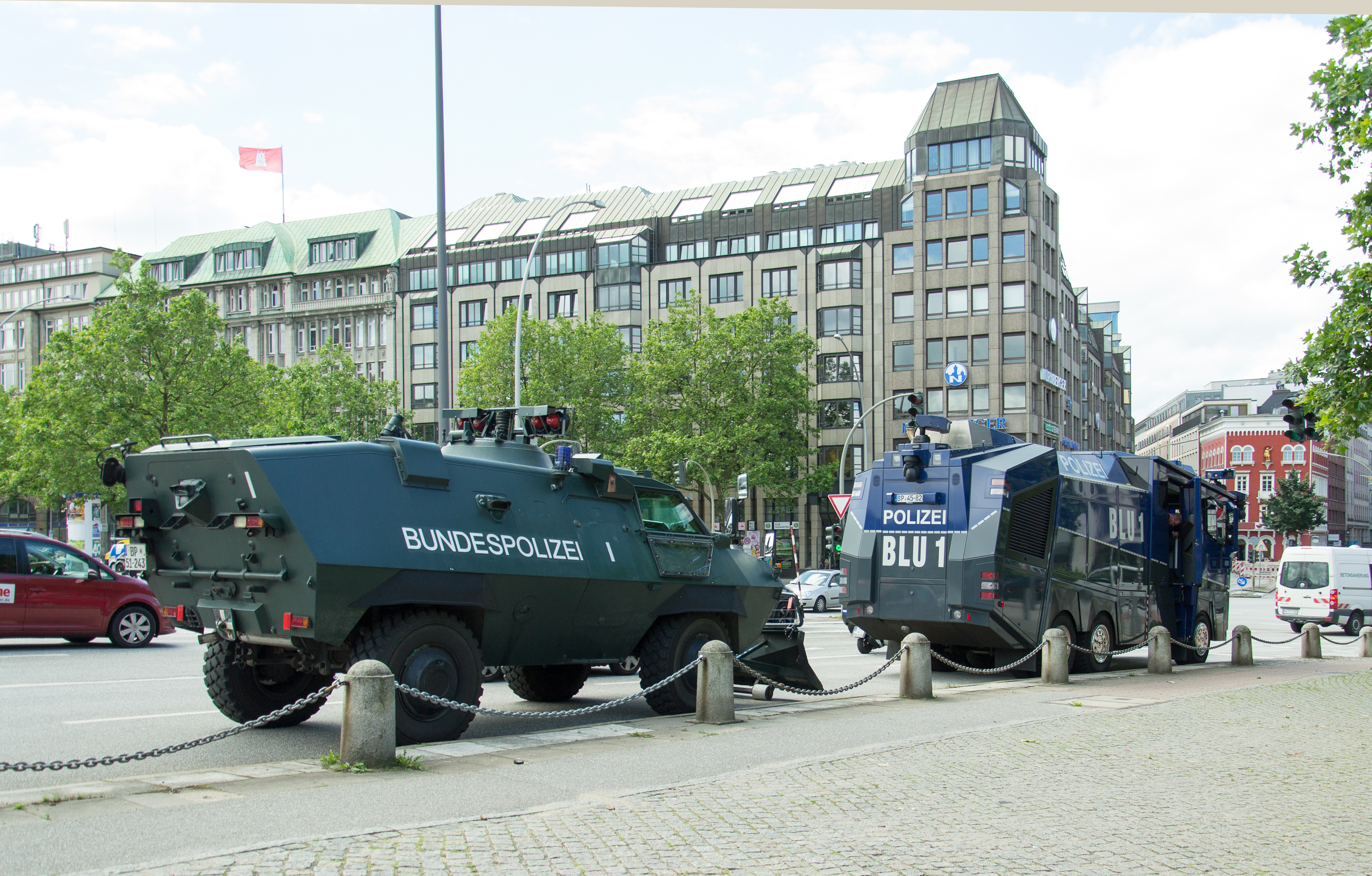 Wasserwerfer und andere Einsatzfahrzeuge prägen das Hamburger Stadtbild während des G-20 Gipfel